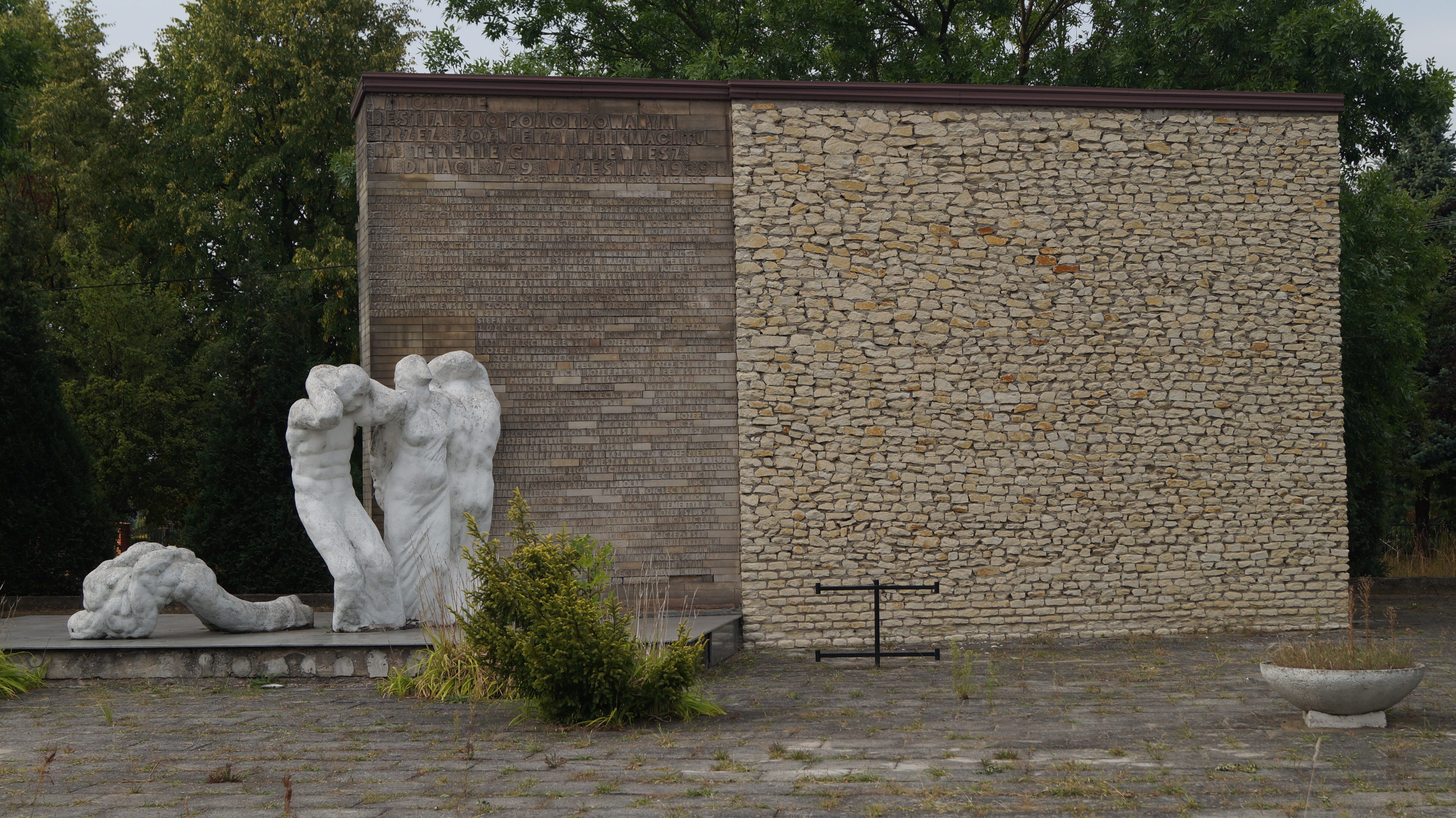 "Pomnik pomordowanych przez Wehrmacht" - pomnik autorstwa rzeźbiarza Michała Gałkiewicza